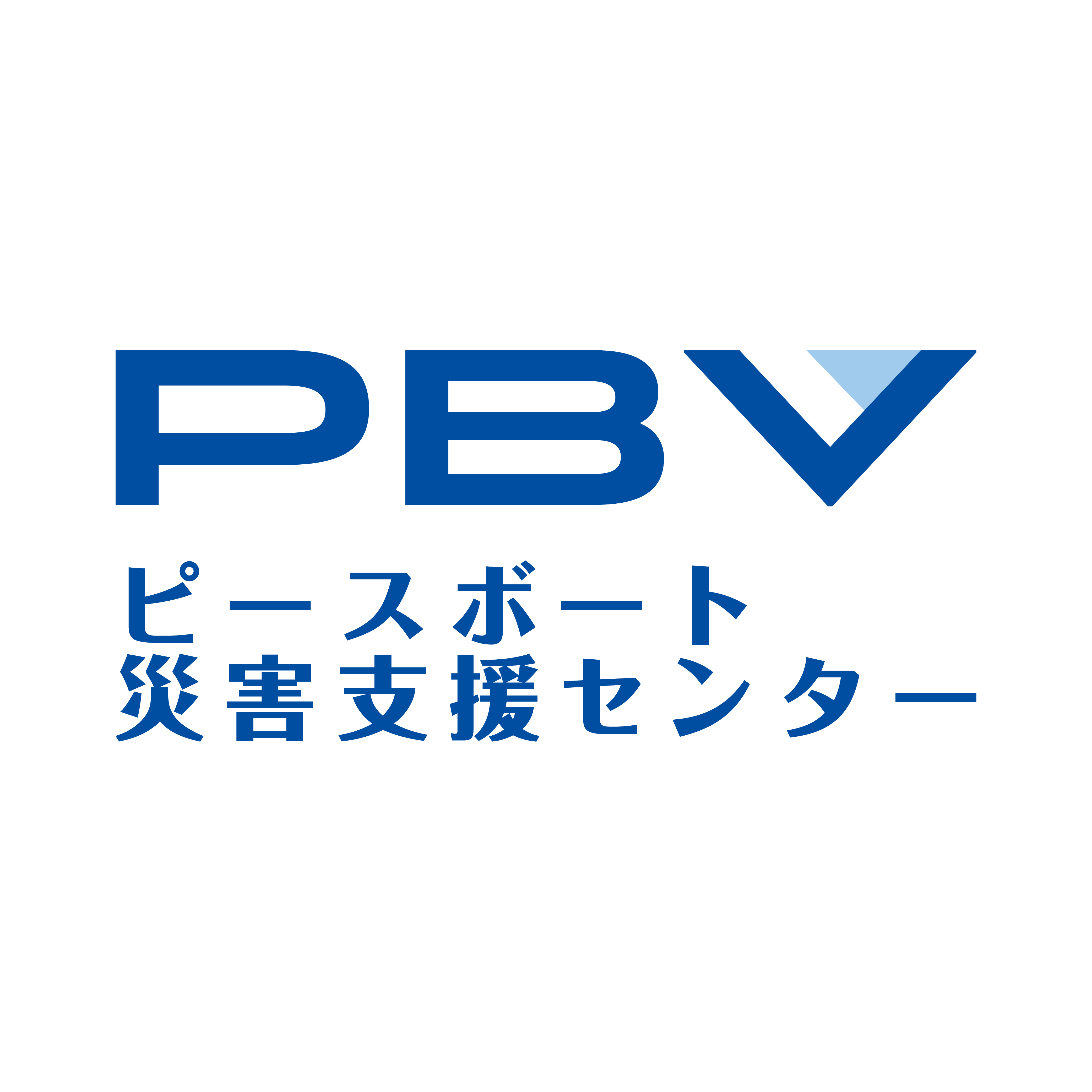 PBVのロゴ